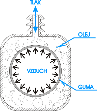 Hydraulika Kategória:Obrázky schém